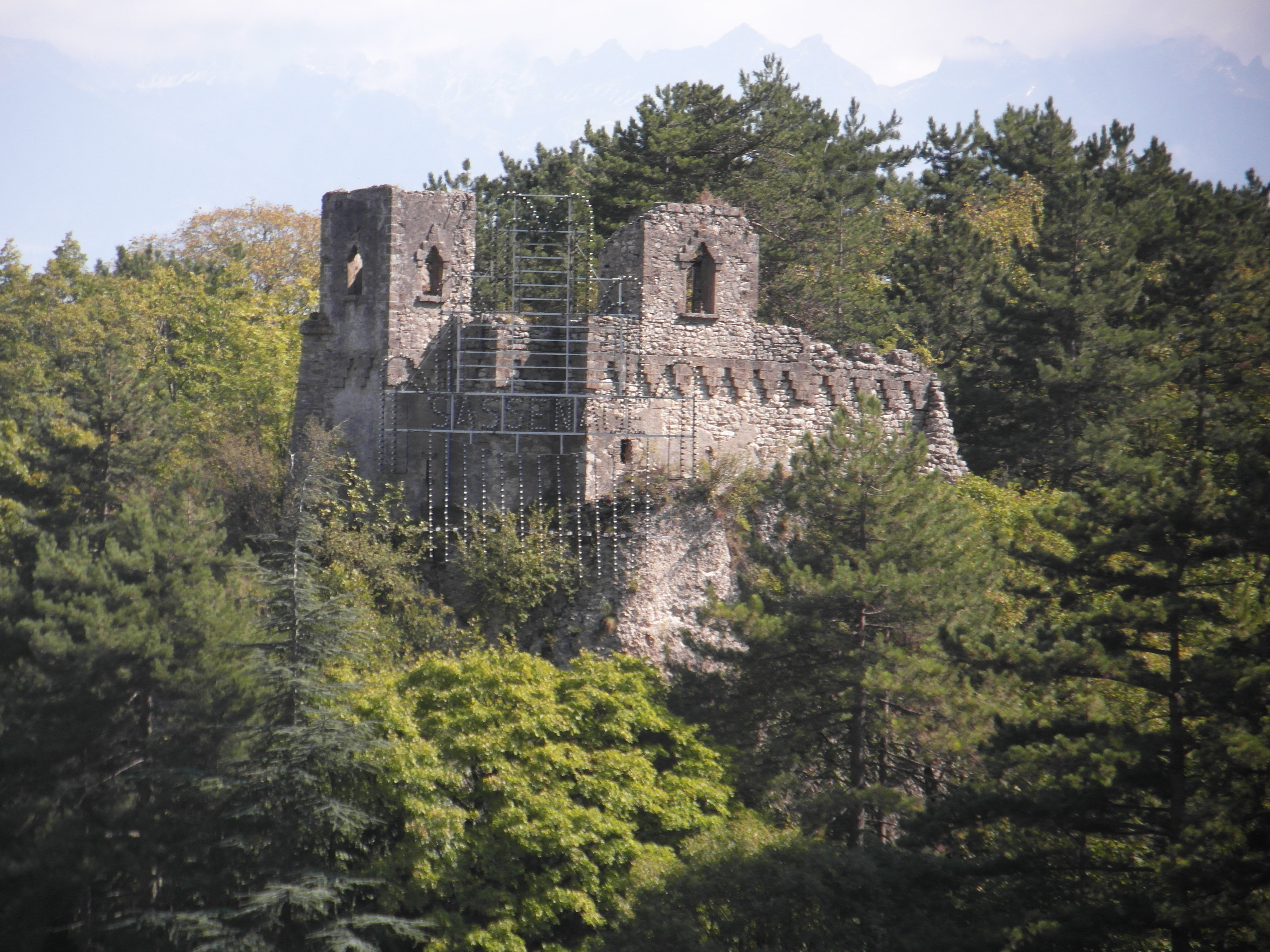 vieux château de Sassenage